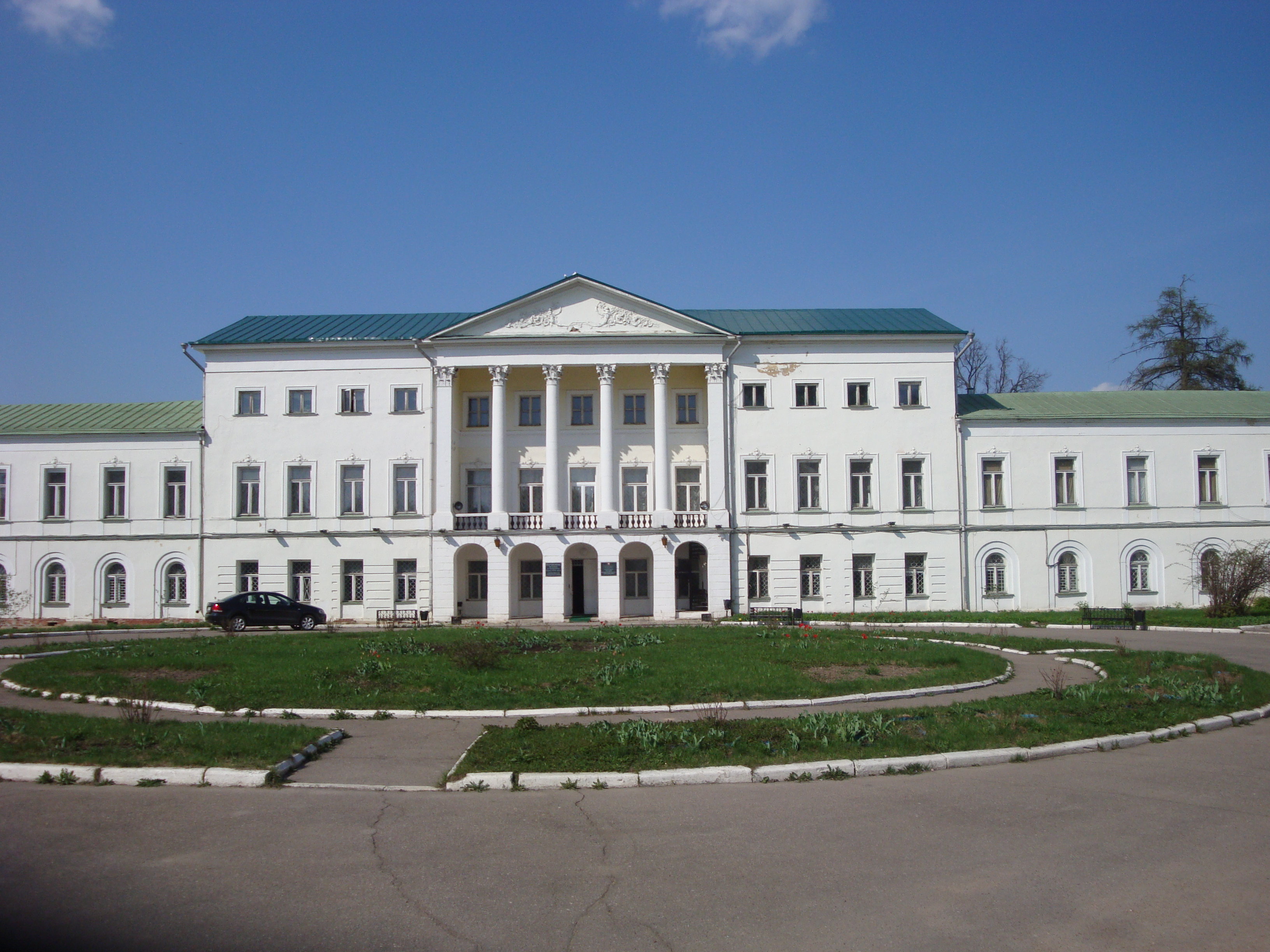 Усадьба Ивановское (Подольск, Московская область)